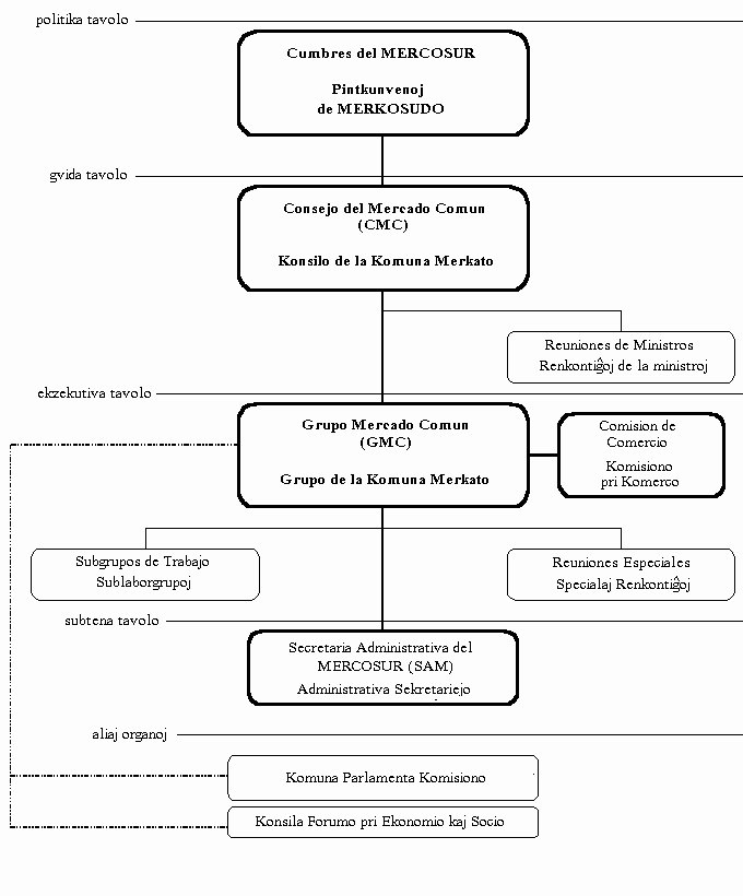 organoj de merkosudo (el :Commons:Dosiero:Mercosur.png)